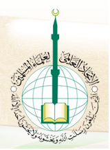 мсму эмблема